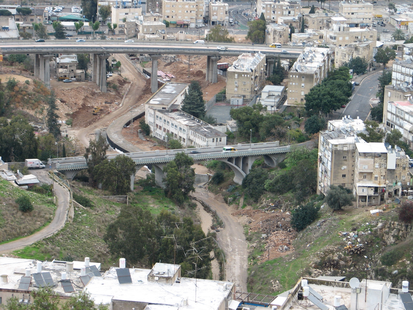 גשר רושמייה ונחל הגיבורים בחיפה.